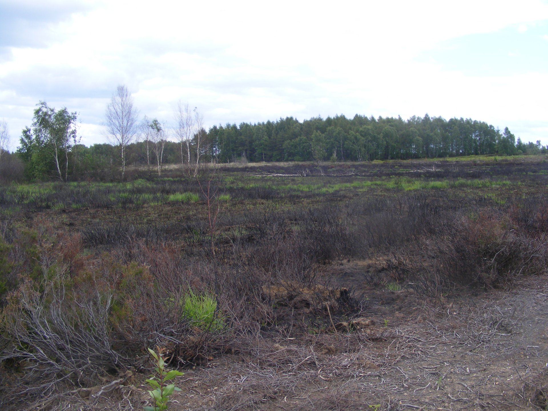 Naturschutzgebiet Drover Heide, kontrolliertes Feuer